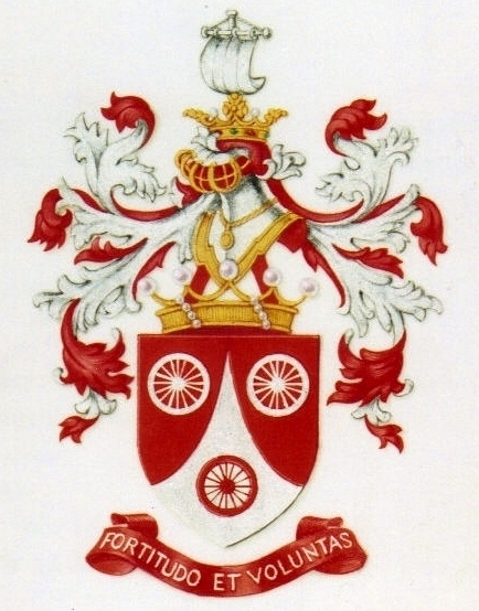 Blason du Chevalier Albert Tricot